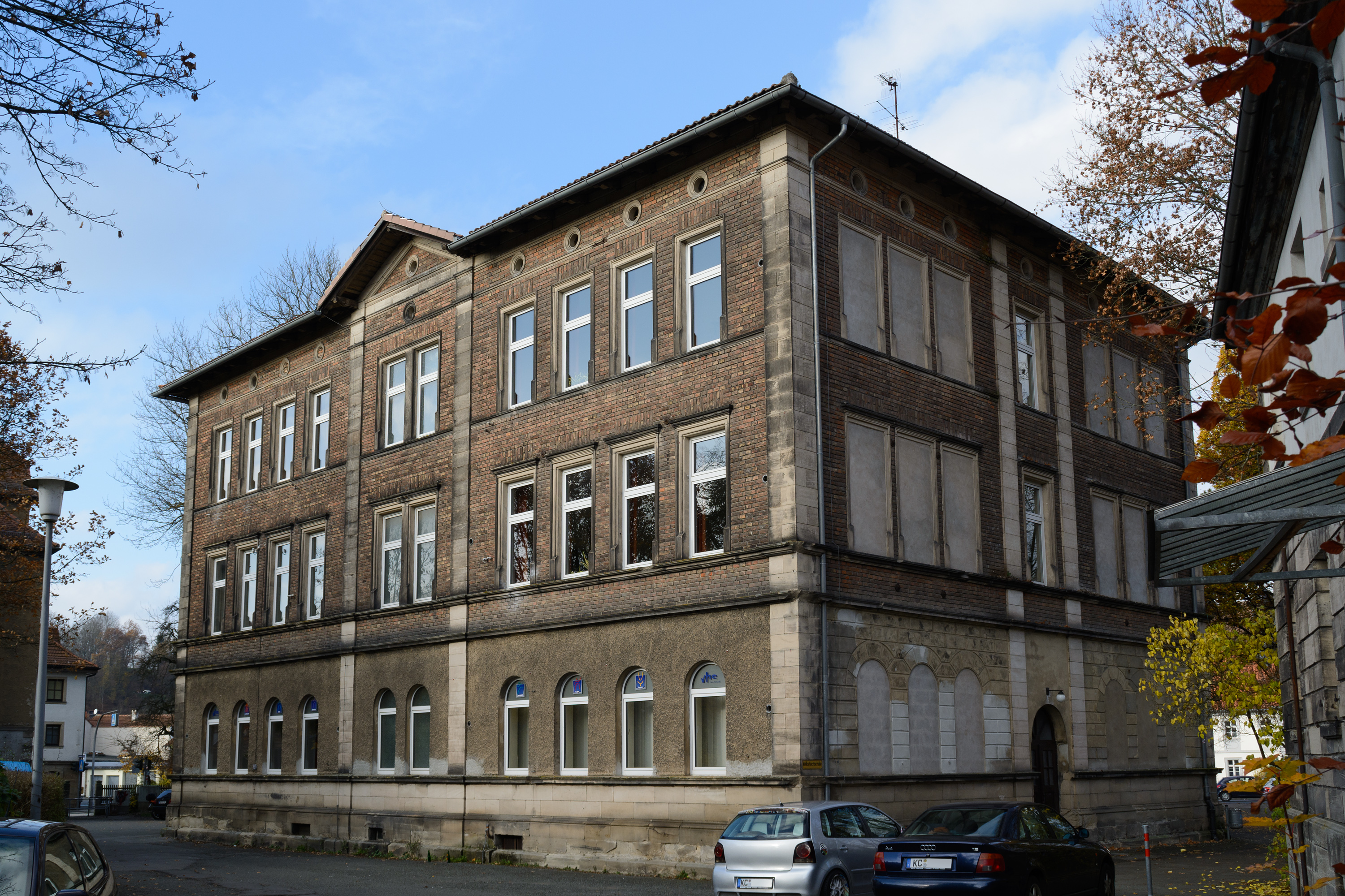 Gebäude Kulmbacher Straße 1 in Kronach, ehemalige Realschule